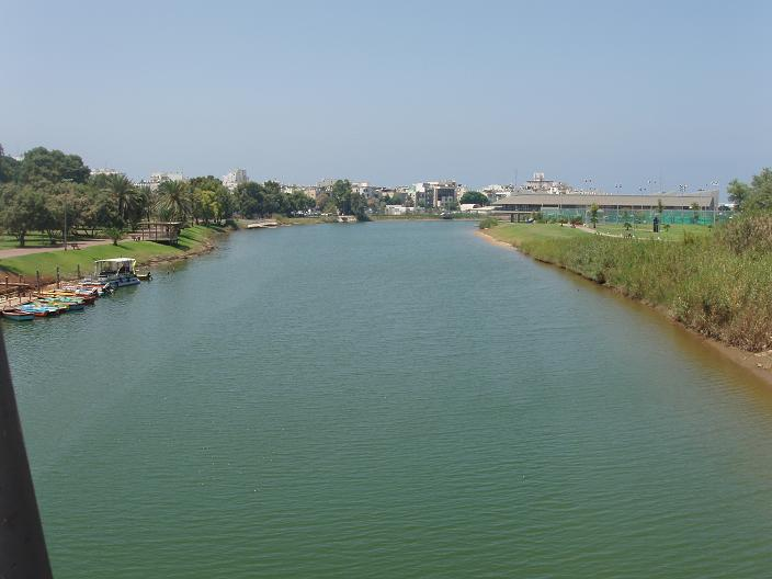 נחל הירקון, בחלקו שממערב לרחוב אבן גבירול